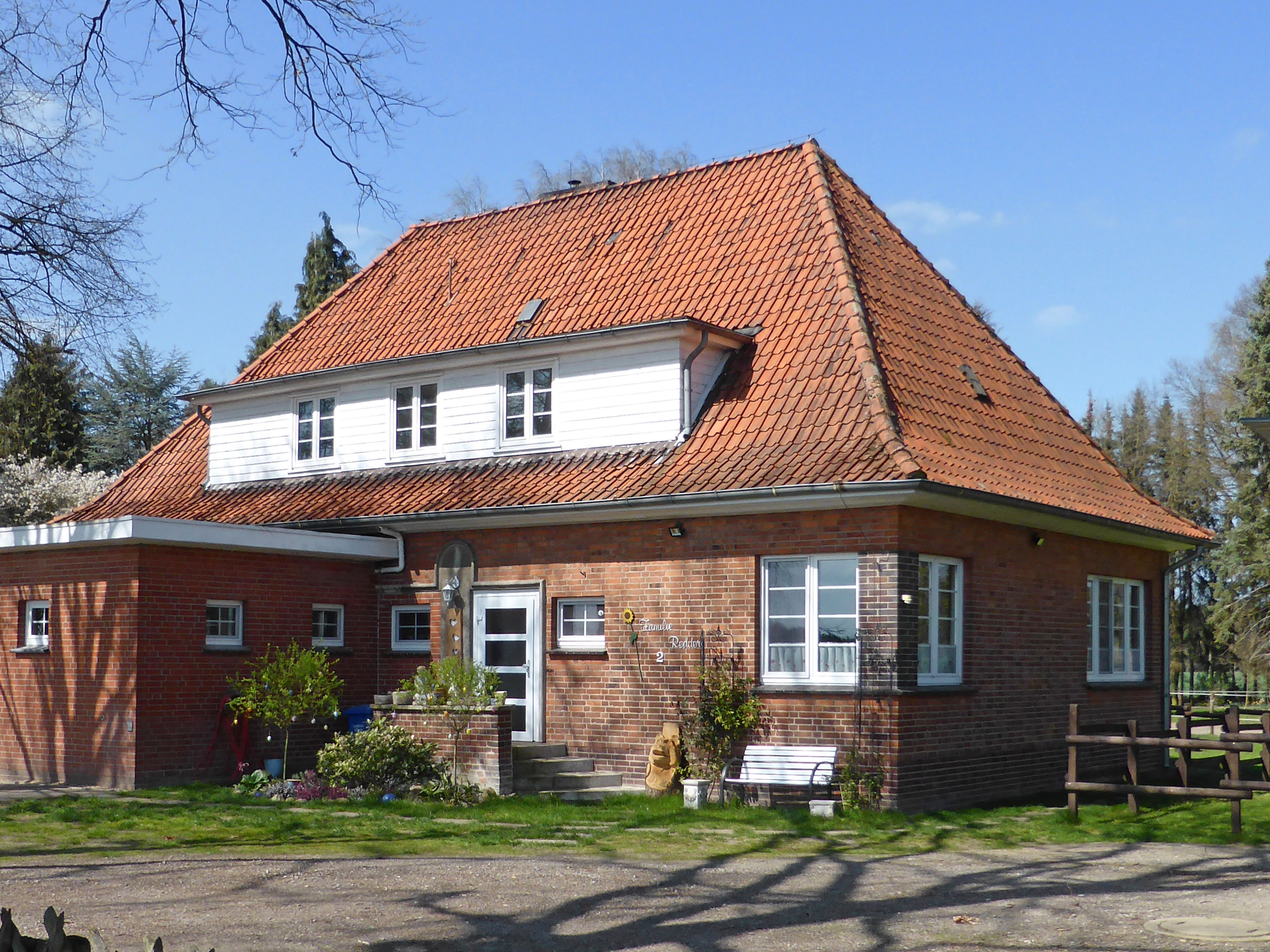 Ehemalige Schule in Zahrenholz, später Gaststätte "Heidpark", Schmarloh.